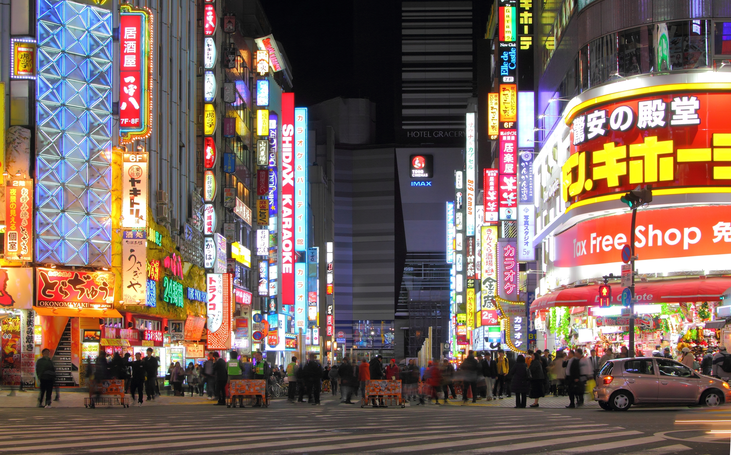 歌舞伎町セントラルロード（正面奥は「新宿東宝ビル」）